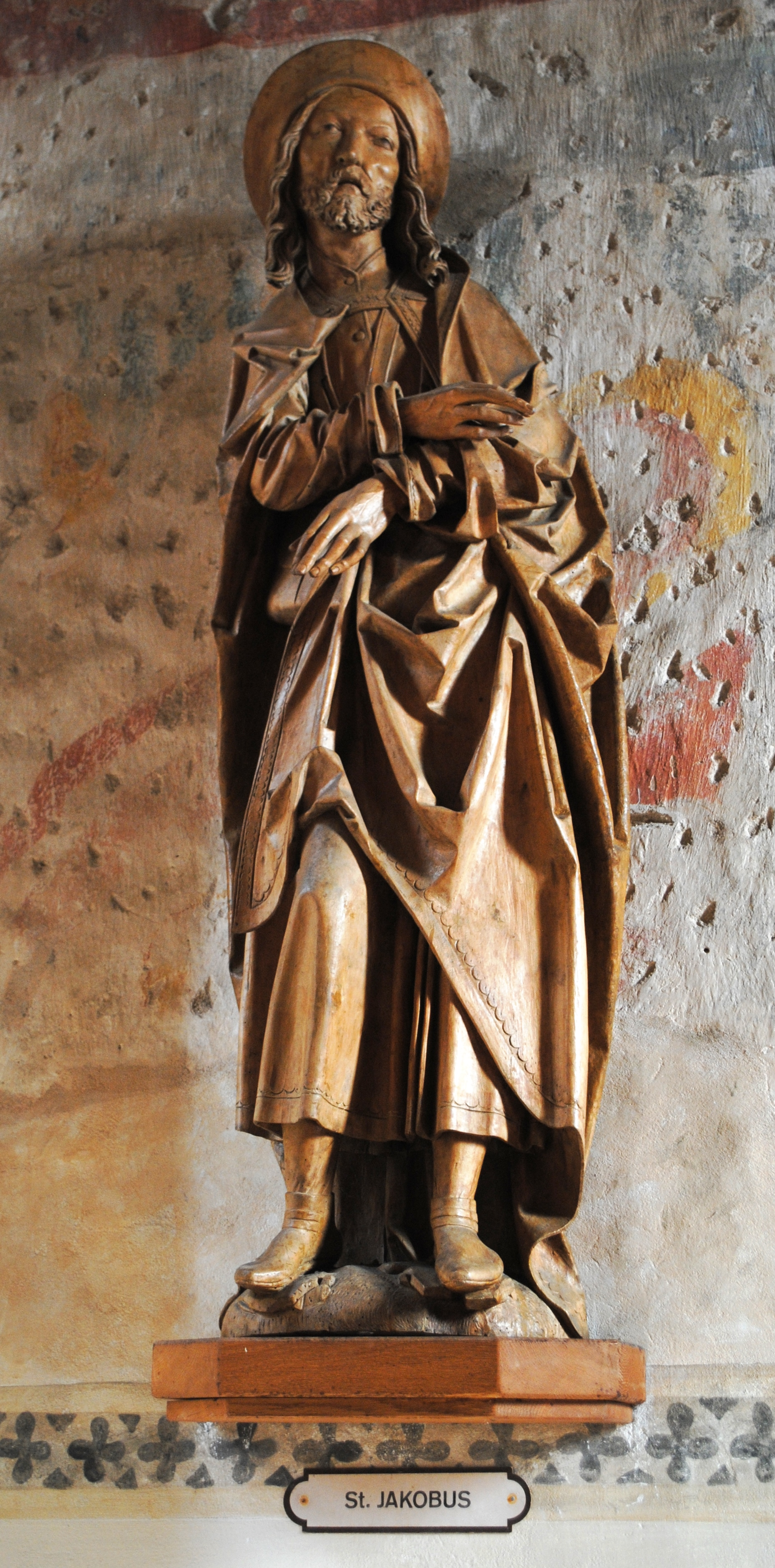 Jakobus der Ältere, Großlangheim, Antoniuskapelle